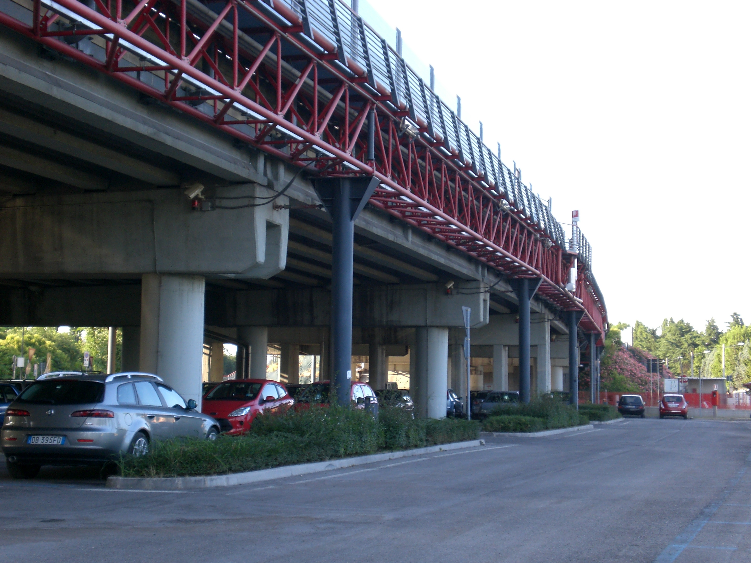 L'autostrada A57 a Cipressina-Mestre